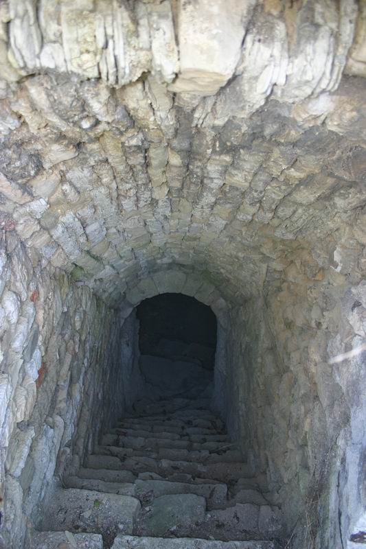 Schraplau Burg - Zugang zu einem Kellergewölbe